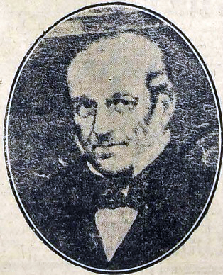 Miguel José de Zañartu Santa María (Concepción, 1786 - ibídem, 25 de octubre de 1851) fue un político y abogado chileno. Fue nombrado primer Ministro del Interior y Relaciones Exteriores de Chile.